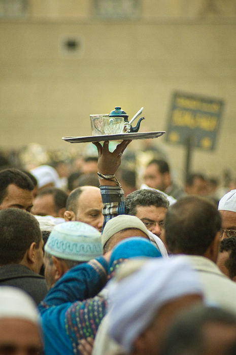 يعد الشاى هوا المشروب الرسمى فى مصر ويحظى بمكانه كبيرة فى المجتمع المصرى This is an image of food from Egypt